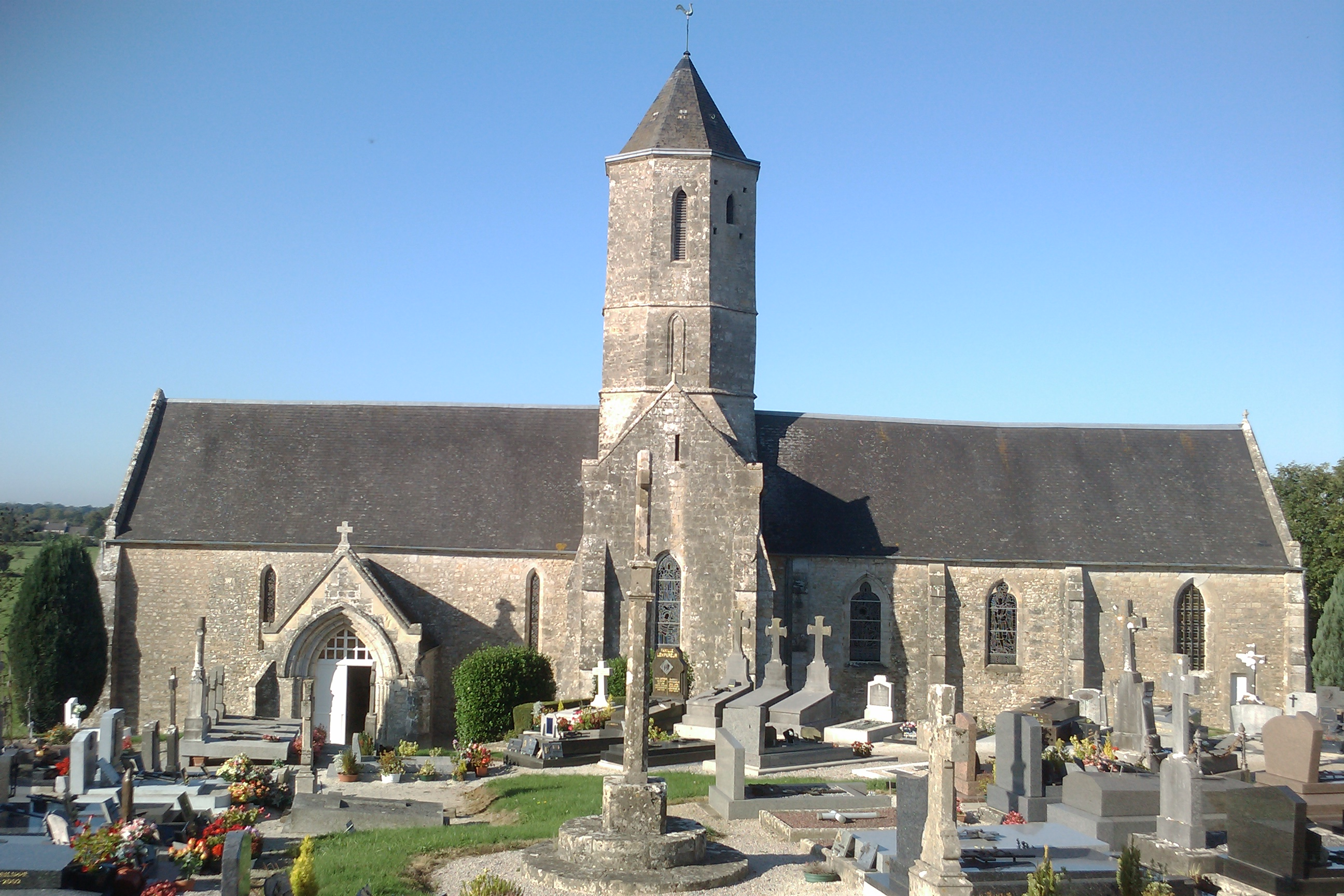 église Saint-Vincent de Beuzeville-la-Bastille